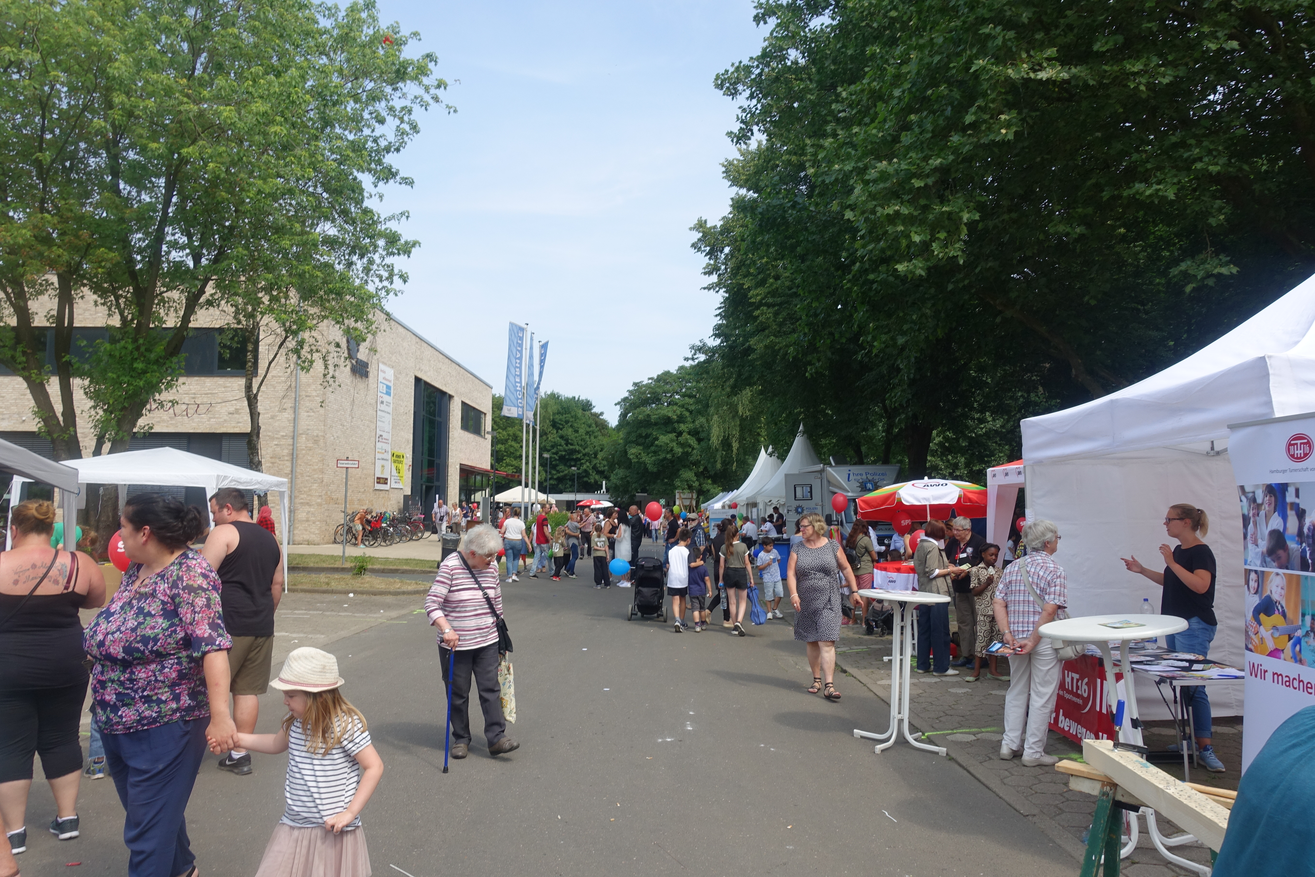 Stadteilfest in Hamburg-Horn 9.6.2018